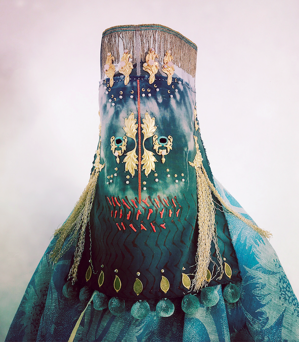 Maske, wearable art, laget av Magnhild Kennedy, kunstnernavn Damselfrau